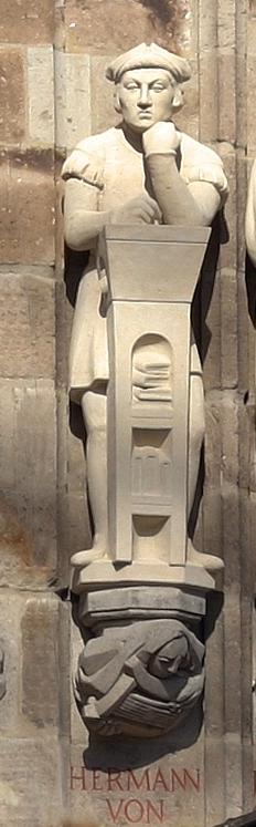 Rathausturm Köln mit der Figur des Hermann